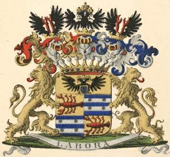 Cancrini suguvõsa krahvivapp